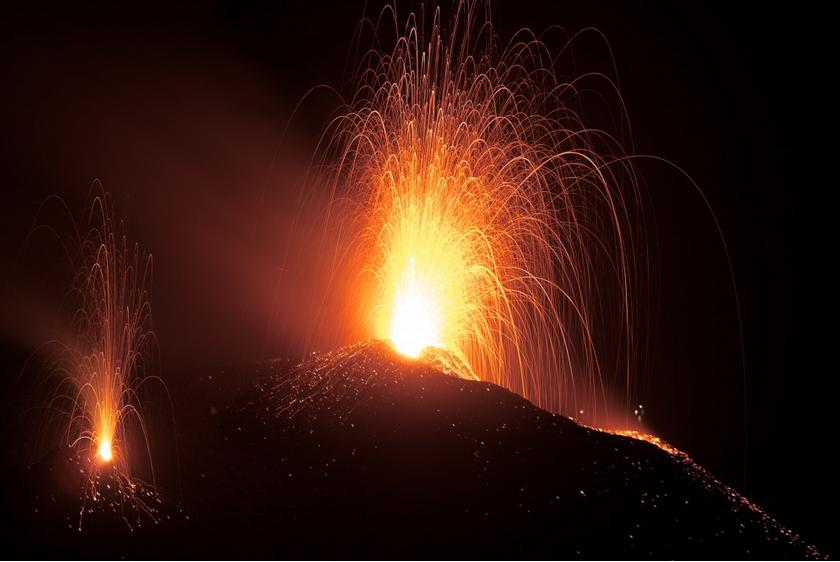 eolie_stromboli_10